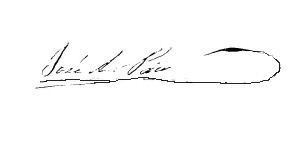 Signature of Venezuelan president José Antonio Páez (1790 - 1873).